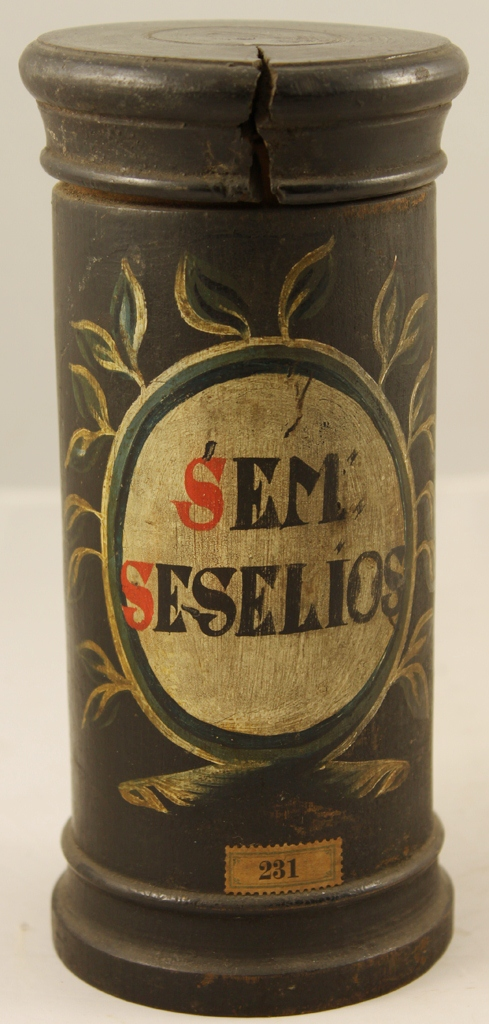 Schwarzes zylindrisches Holzgefäß mit Deckel, zu 20% gefüllt; aufgemaltes Schild mit Pflanzendarstellung. Beschriftung, rot und schwarz: "SEM. / SESELIOS". Se. Seselios = wahrscheinlich Samen einer Bergfenchel ( Seseli)- Art, eine Apiaceae, mit Vorkommen